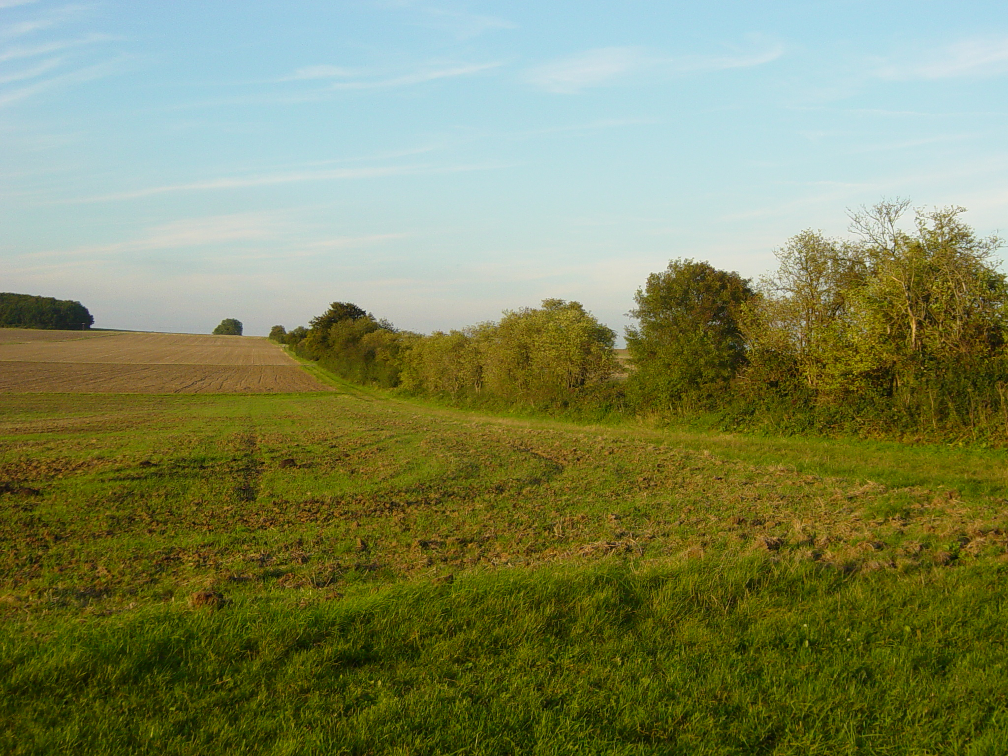 Baum- und Buschstreifen am Limes zwischen Holzheimer Unterwald und Wp. 4/49. Blick von Südwesten unmittelbar nördlich des Holzheimer Unterwalds